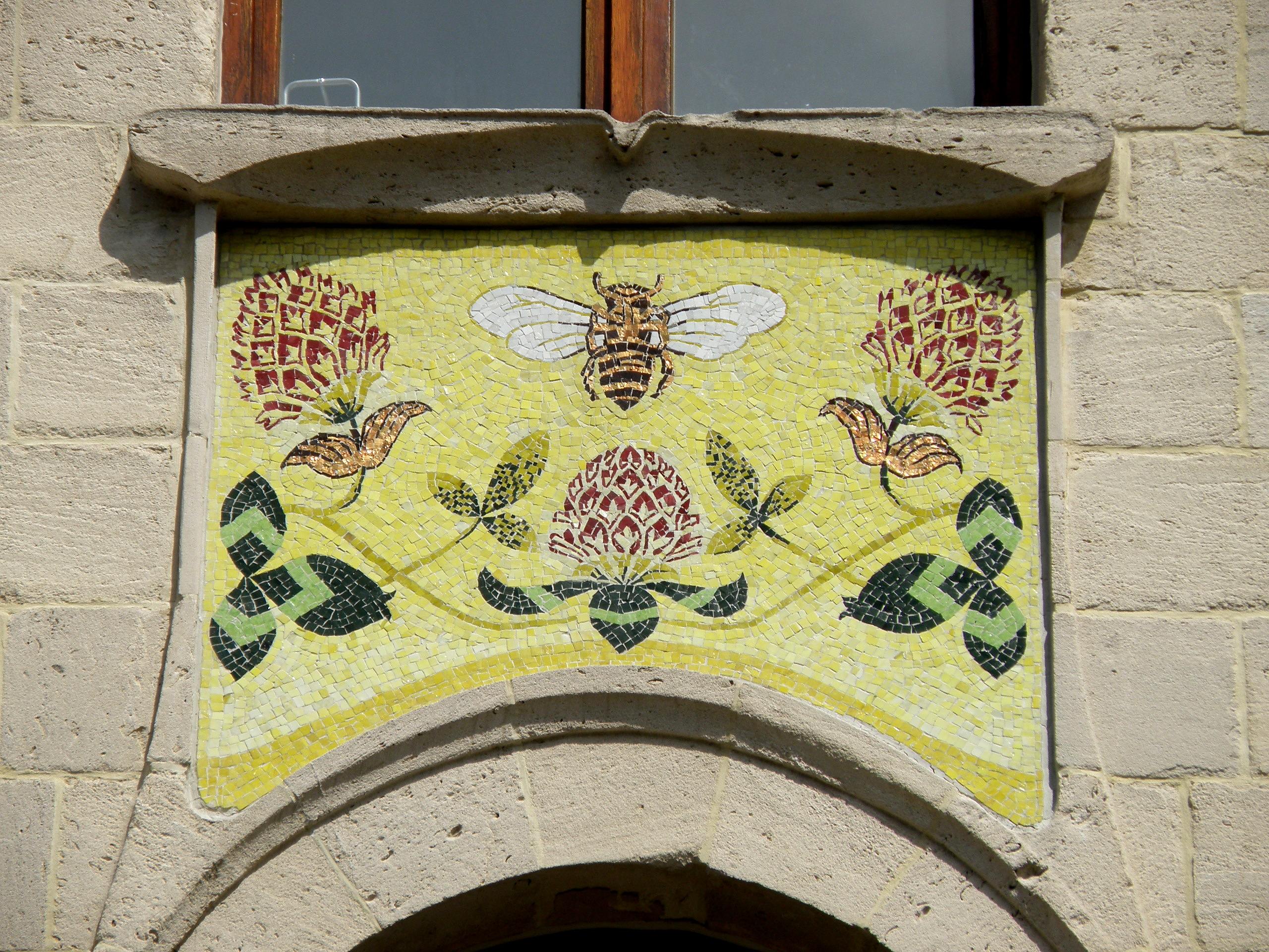 Antwerpen (België), Oostenstraat nr. 28. Art-nouveauwoning ’t Daghet in den Oosten, anno 1906, n.o.v. Jacques De Weerdt.